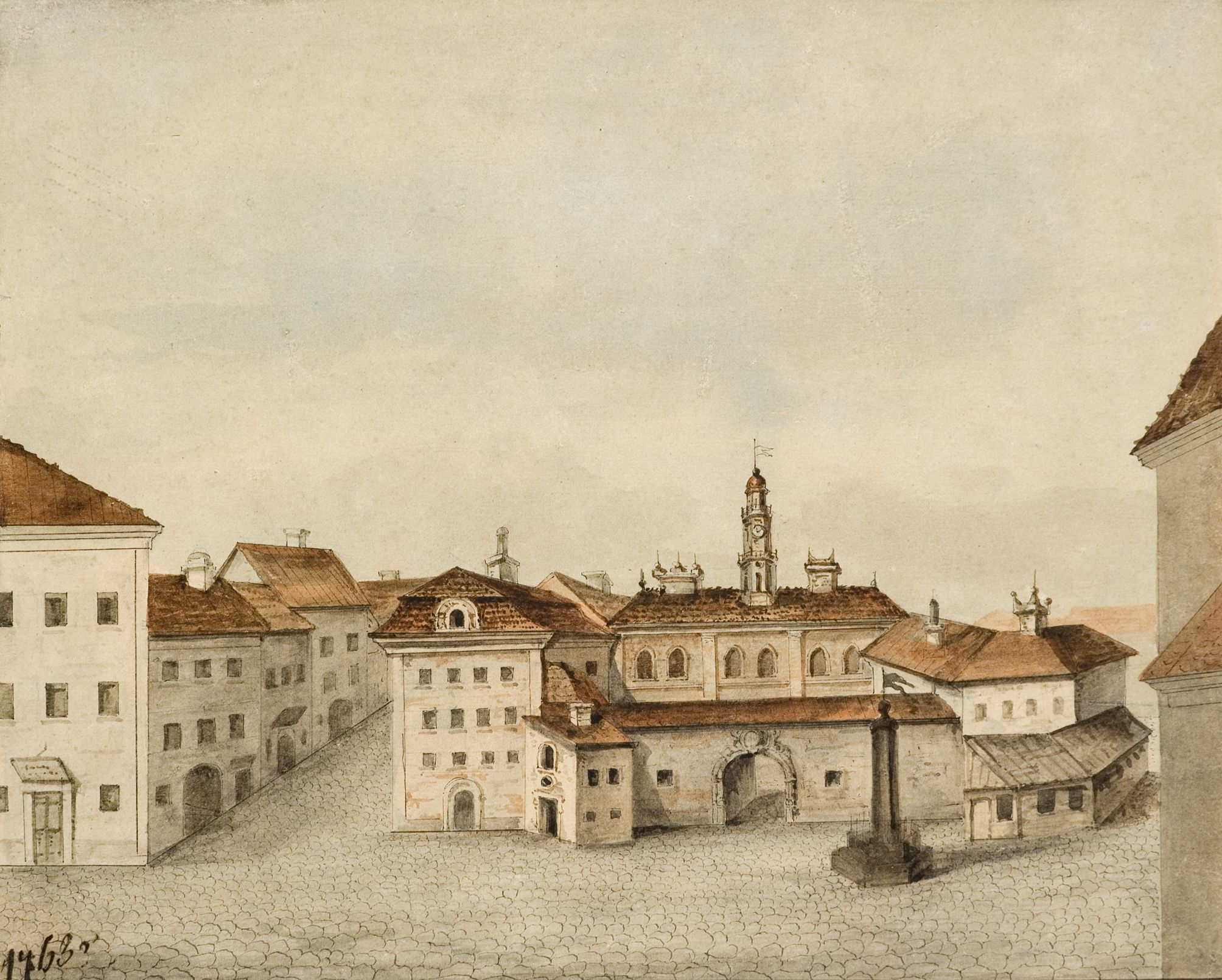 Беларуская (тарашкевіца): Вільня (Vilnia). Ратуша